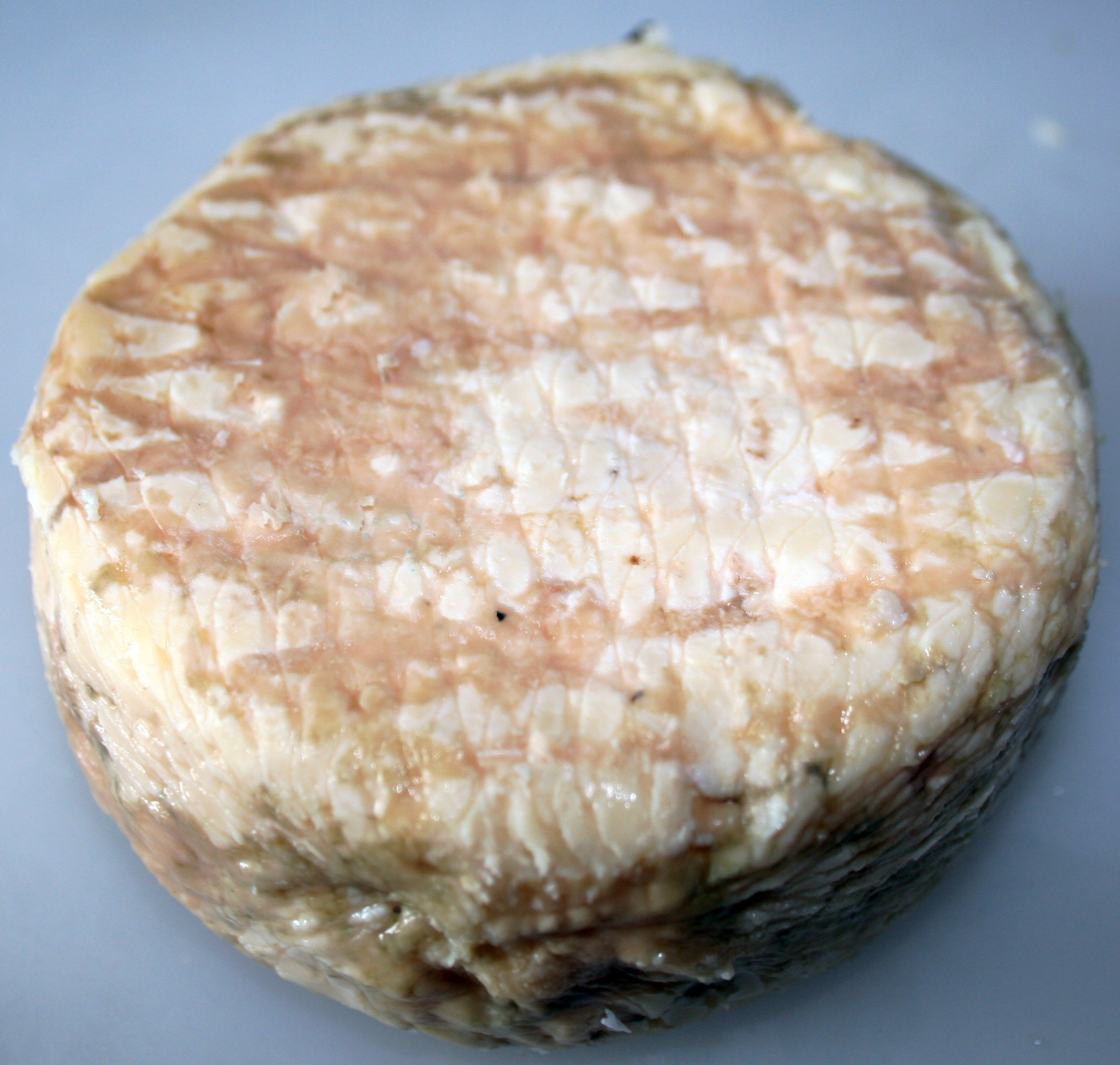 Queso de Porrúa